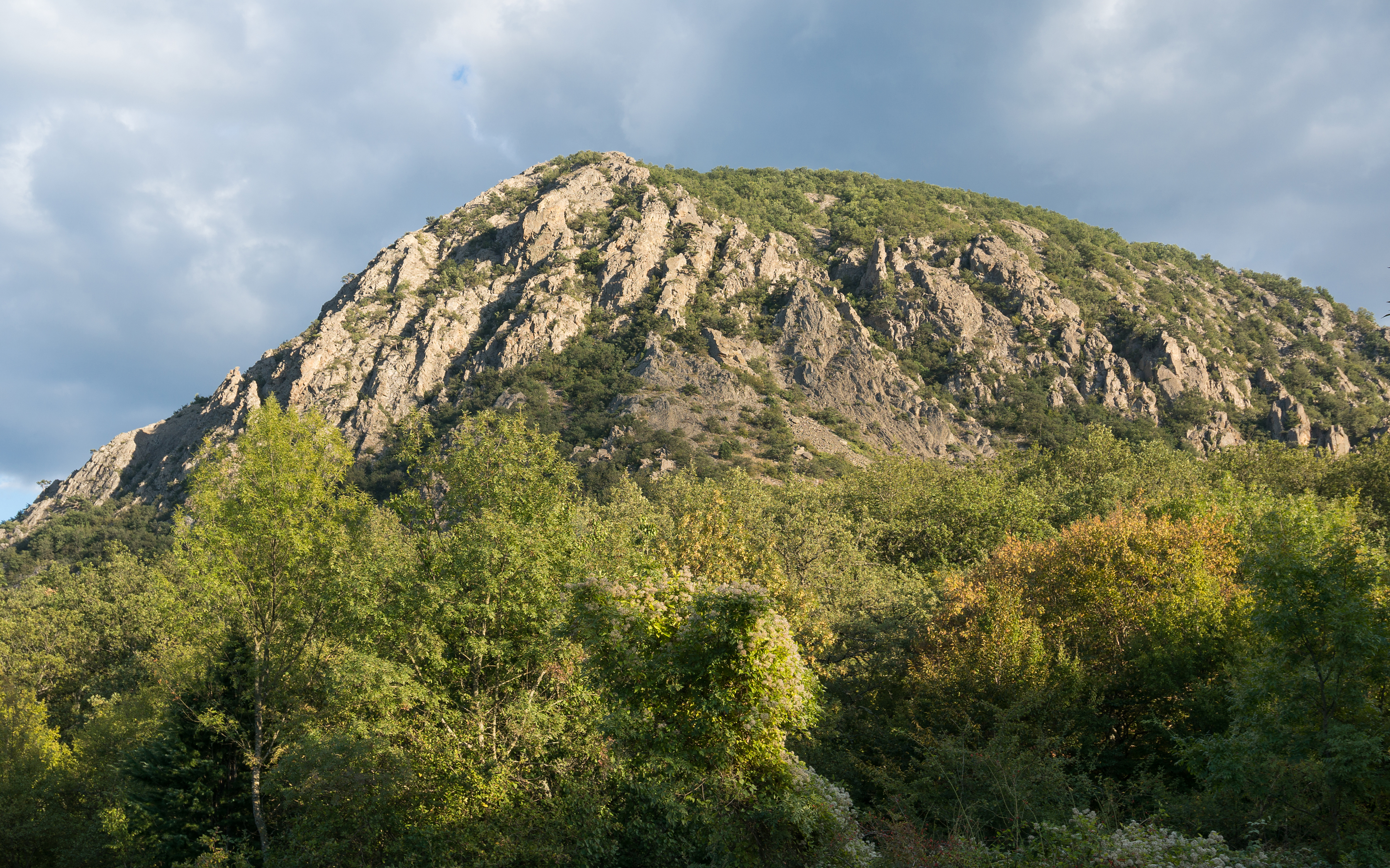 Аю-Даг: Запрудненское лесничество, кв. 32, Партенит, Алушта, Крым This object is located on the Crimean Peninsula and recognized as a protected area by both Russia and Ukraine under the ID: 8200015 / 01-103-5008, respectively. The legal status of the Crimean region is currently disputed.